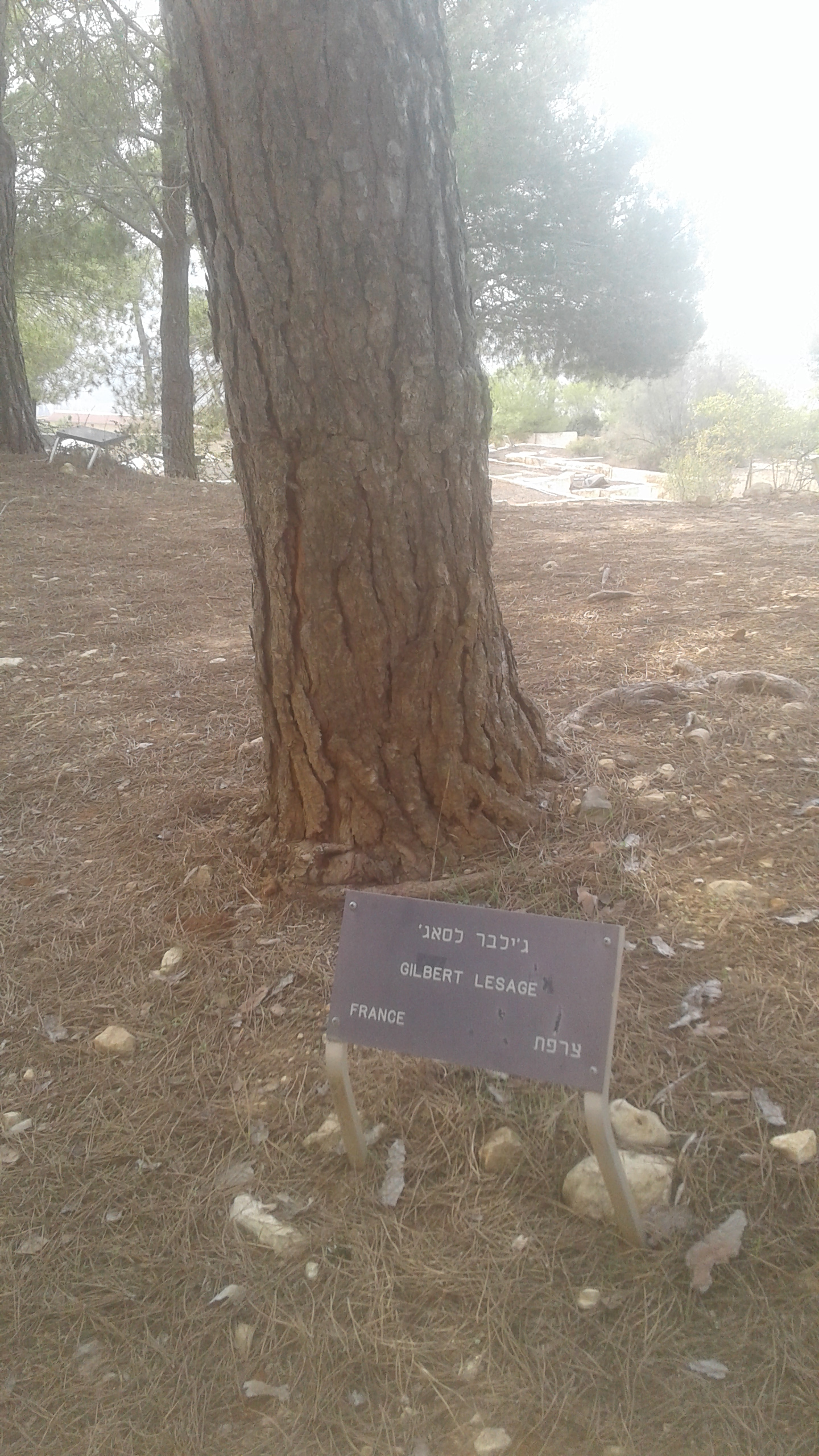 העץ שניטע ביד ושם לזכר חסיד אומות העולם ז'ילבר לסאז'